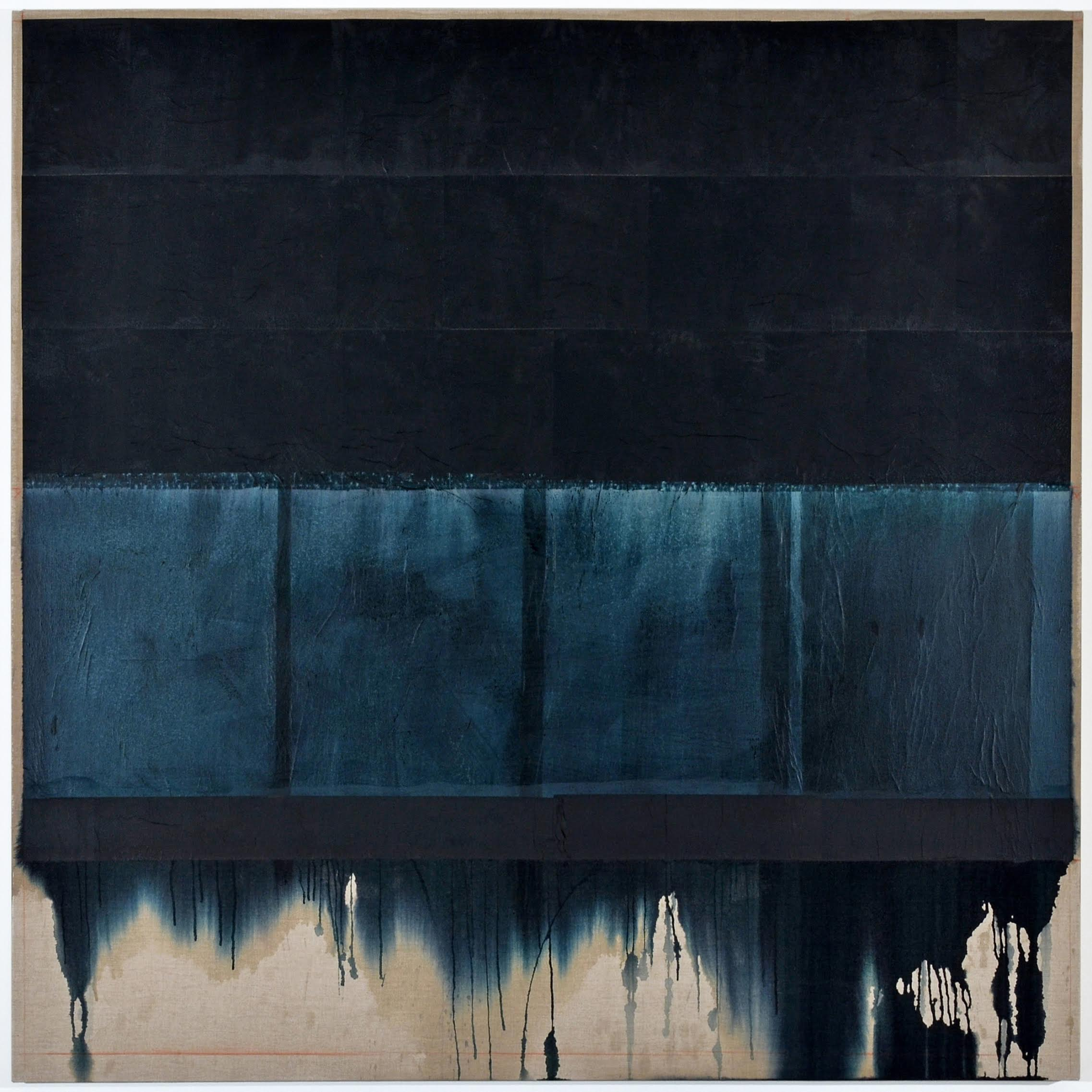 Abbildung eines Werkes von Jakob Gasteiger. Papier auf Leinwand 200 x 200 cm